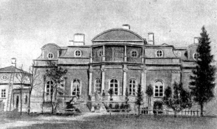 Имение А. К. Толстого "Пустынька" на реке Тосна (архитектор Штакеншнейдер)